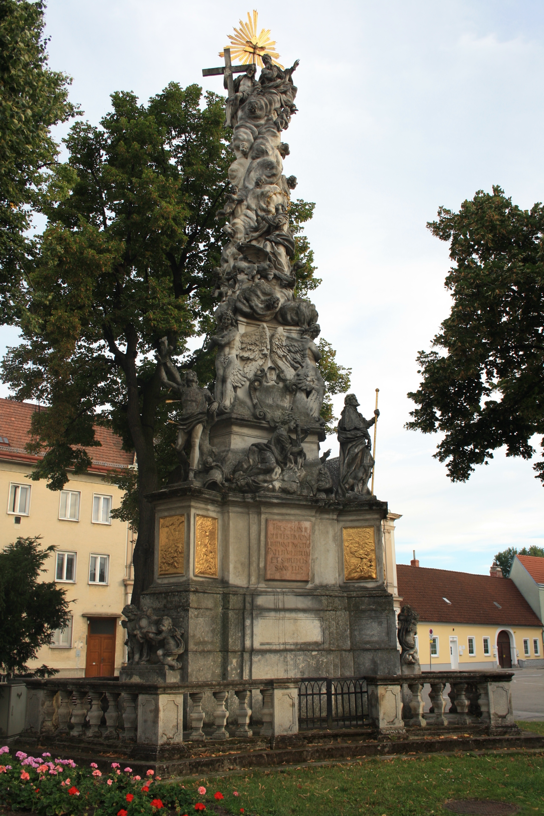 Pest-/Dreifaltigkeitssäule in Stockerau